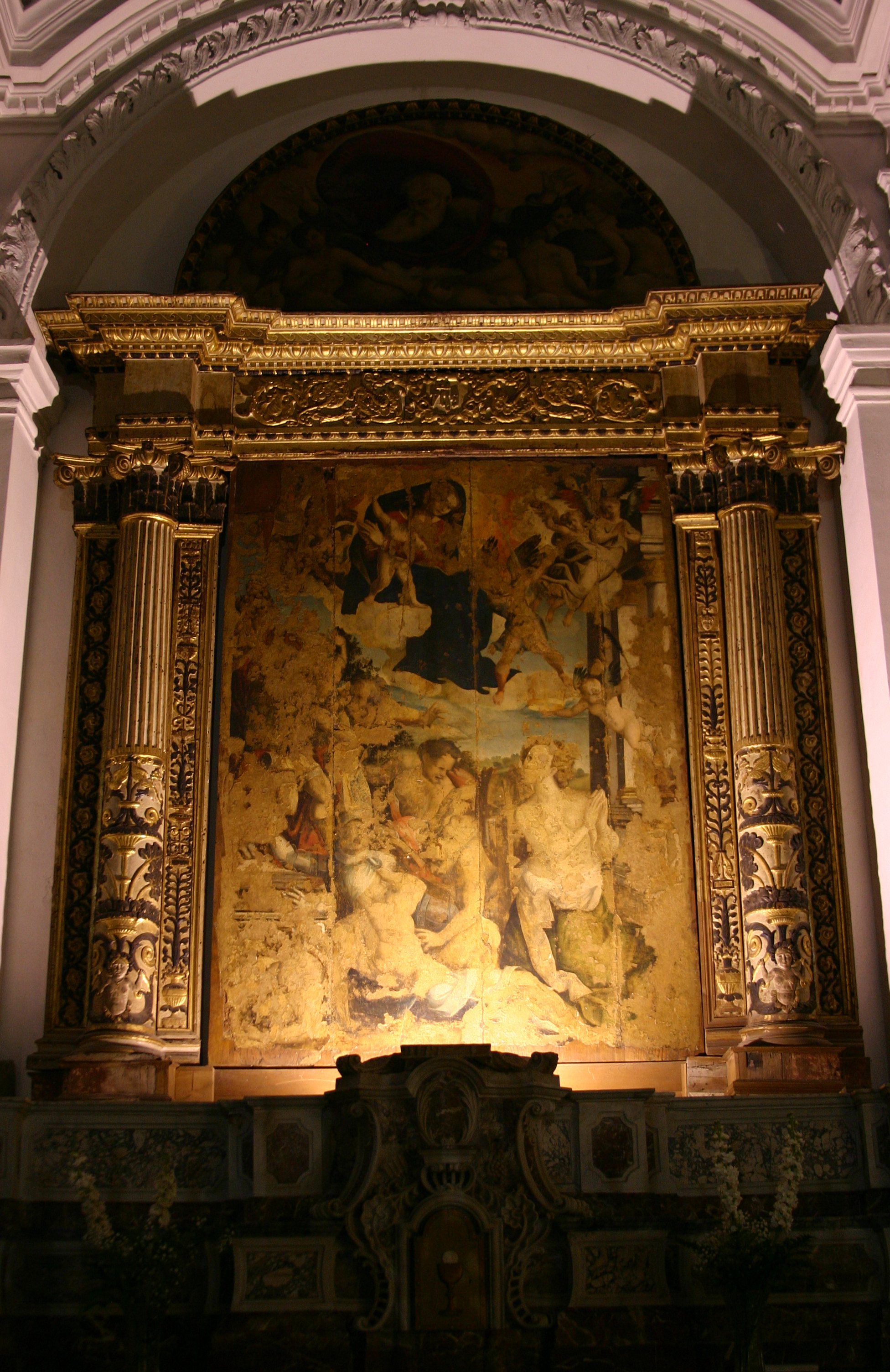 Taormina